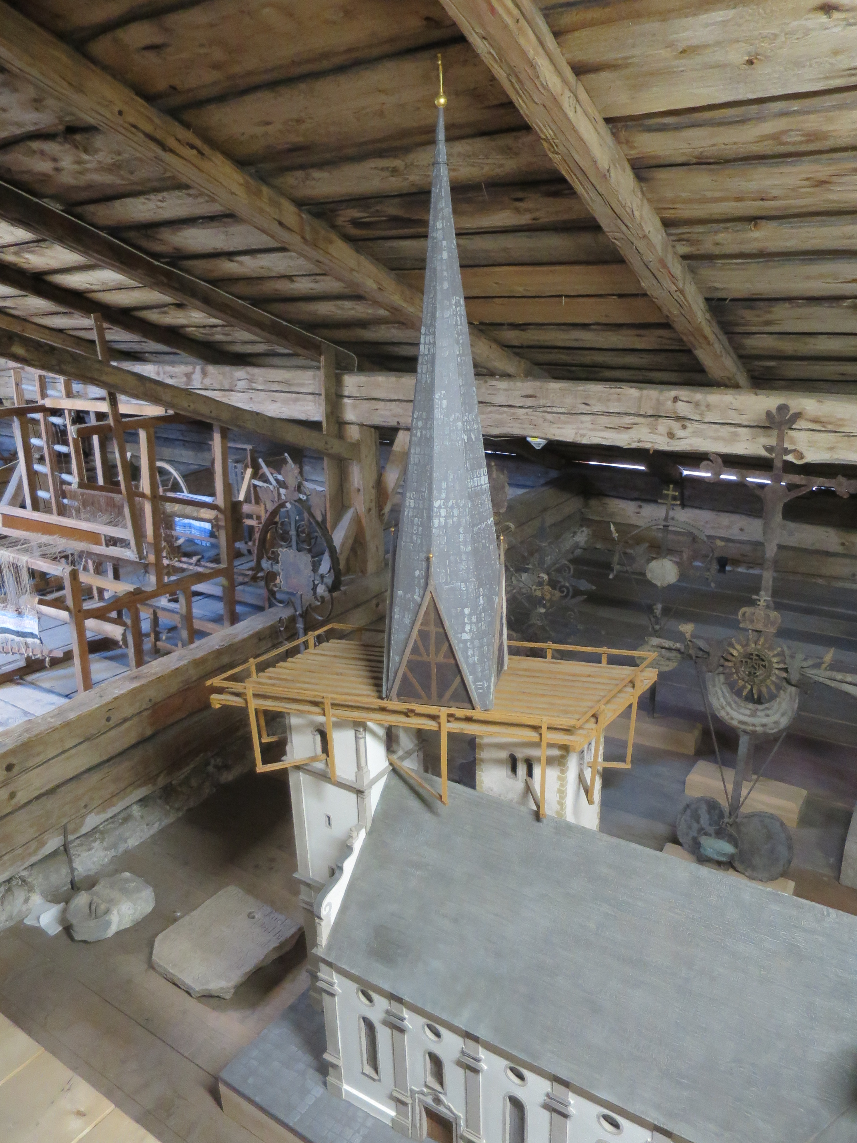 Modell der Verschiebung der Kirchturmspitze auf der Mariä Himmelfahrtskirche in Prien 1736. Heimatmuseum Prien.